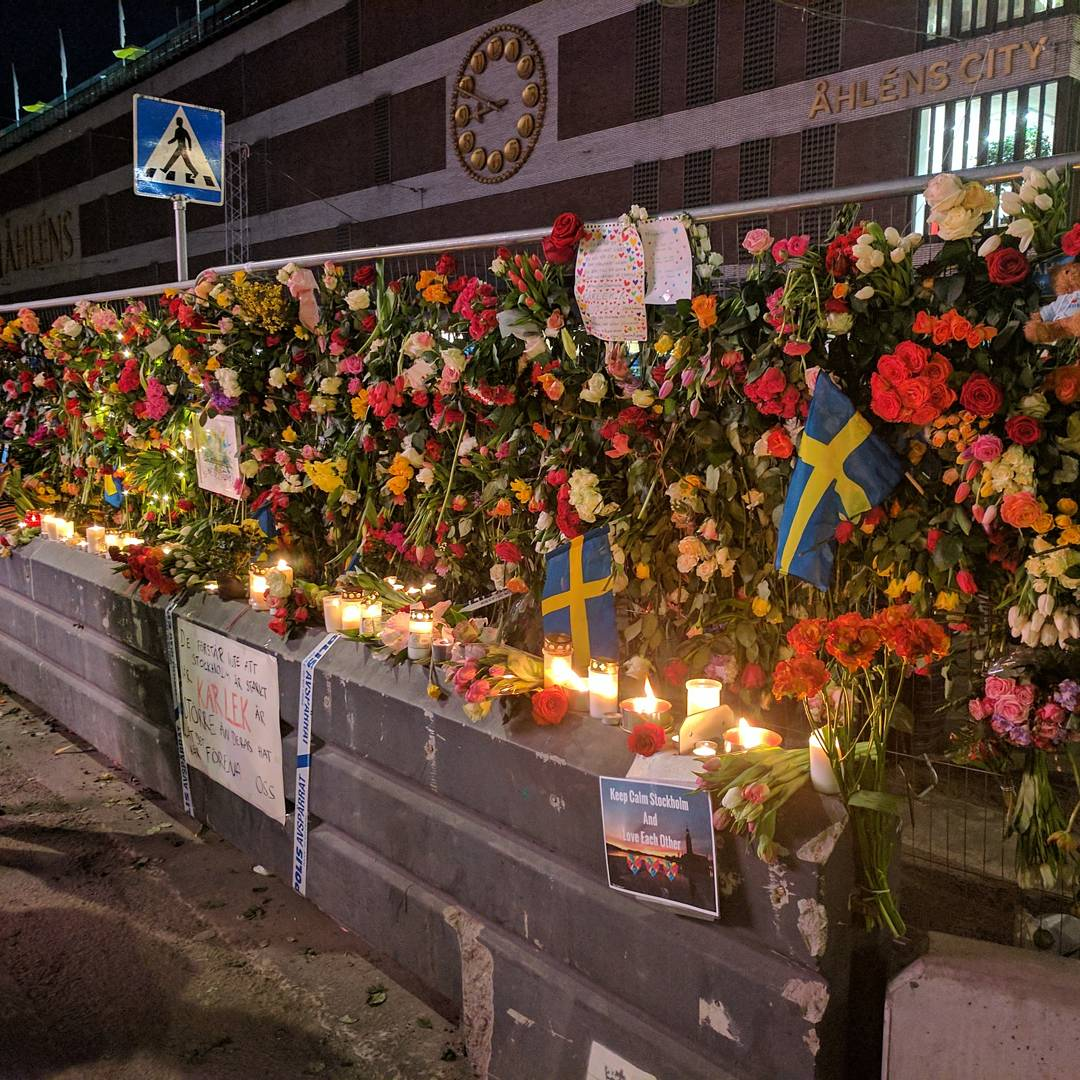 2017 Stockholm attack - 2017-04-08